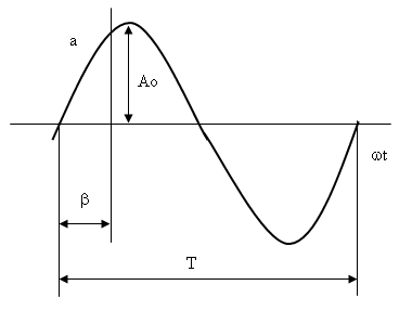 Onda senoidal